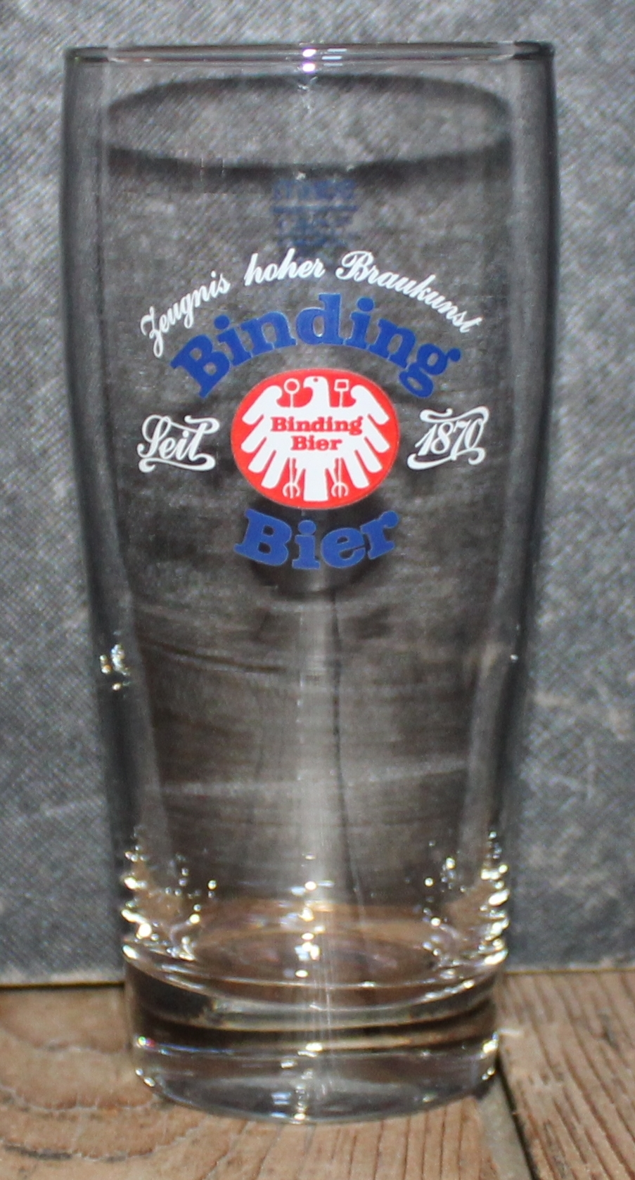 Verre à bière Binding Bier